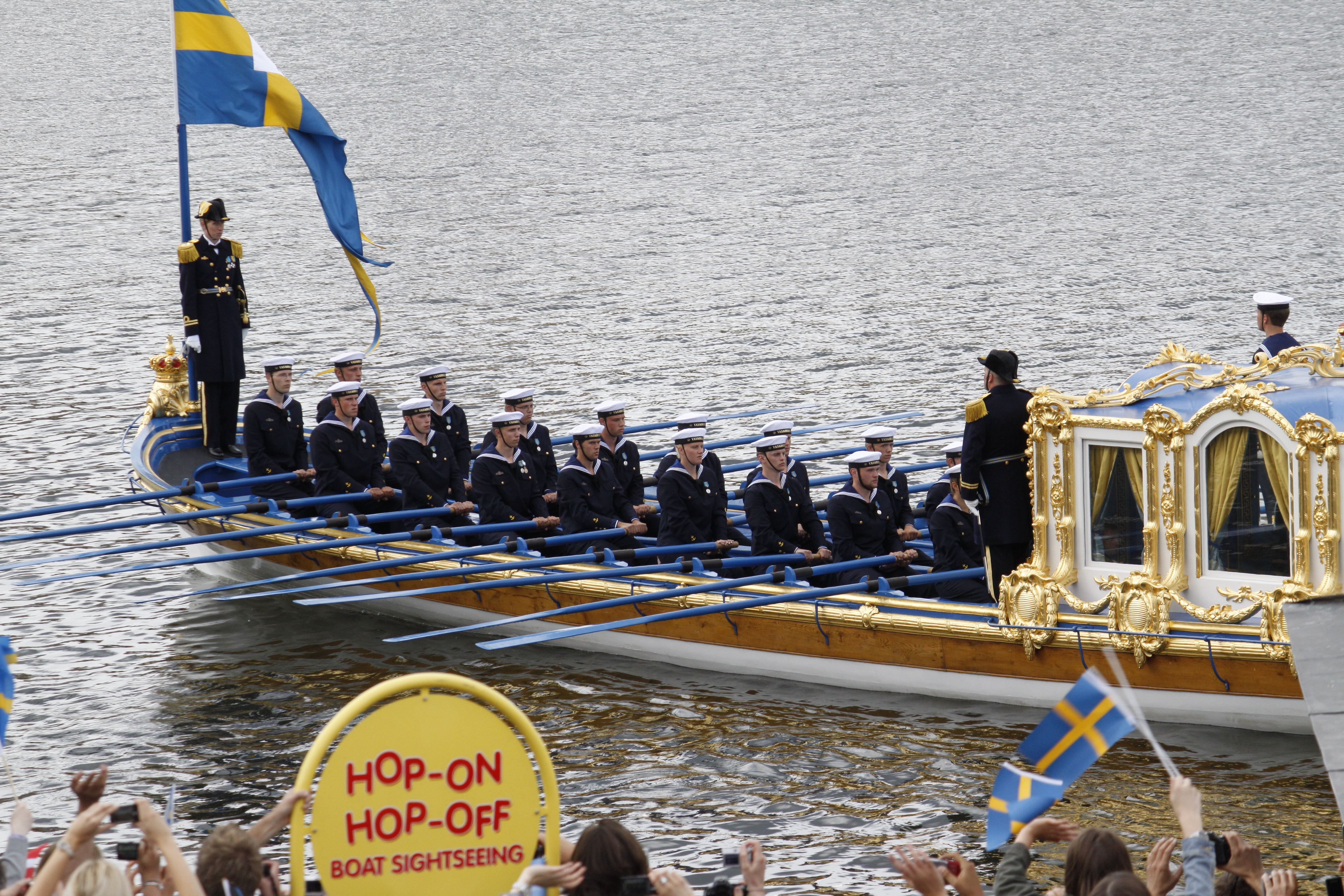 royal barge